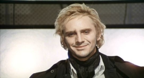 Képkocka a „Különleges történetek” című filmből